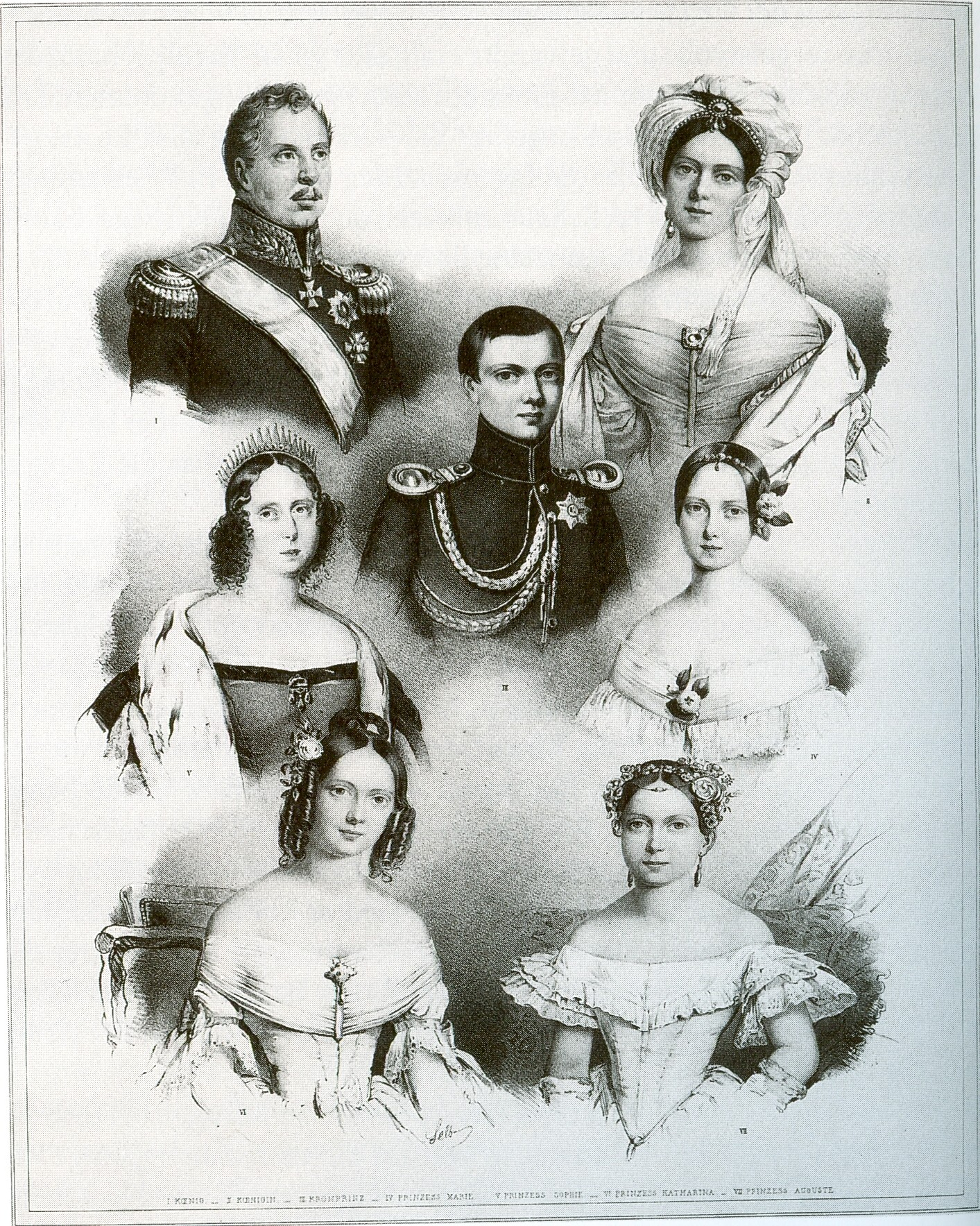 Die Familie König Wilhelms I. auf einem Erinnerungsblatt zum 25.jährigen Regierungsjubiläum: König Wilhelm I. und Pauline von Württemberg (oben), Sophie (links in der Mitte), Kronprinz Karl (zentral), Marie (rechts in der Mitte), Katharina (unten links) und Auguste (unten rechts).